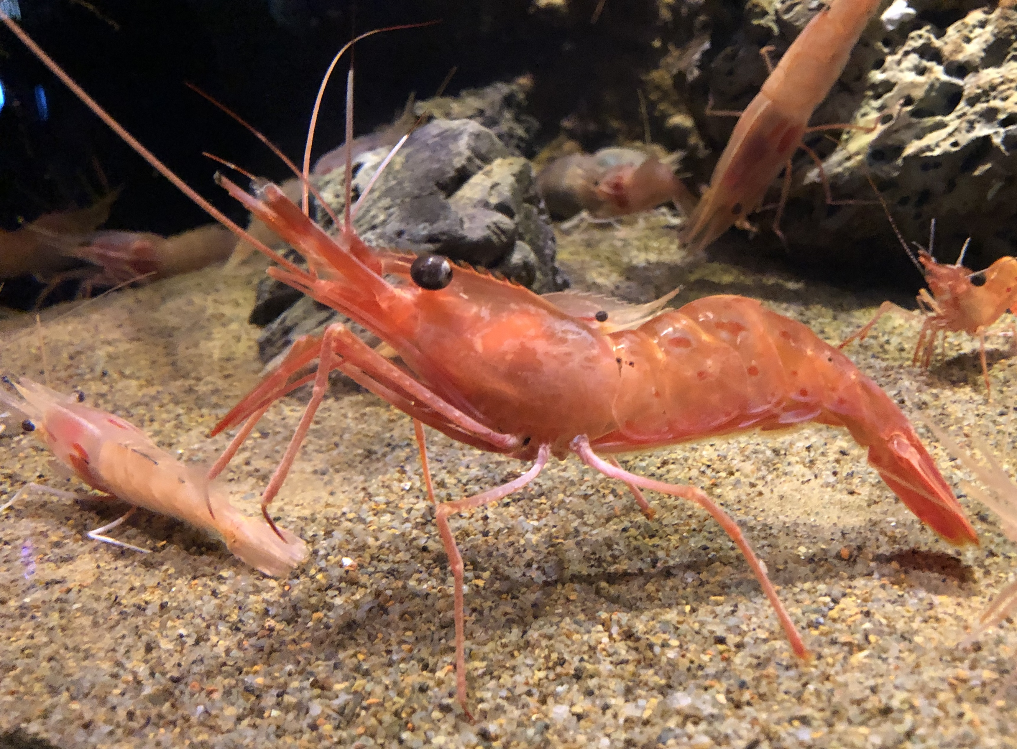 ボタンエビ(Pandalus nipponensis)。沼津港深海水族館飼育個体。